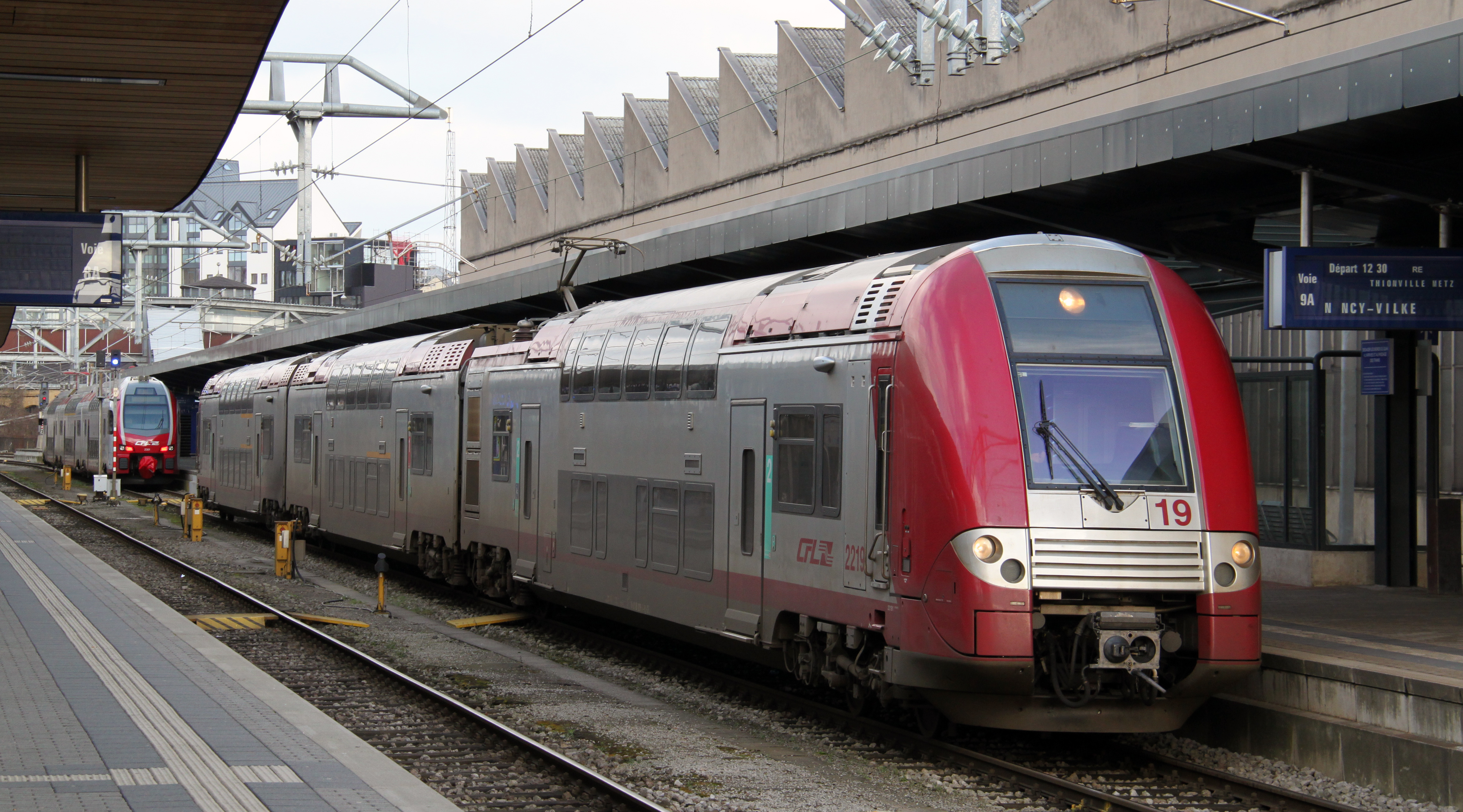 Een treinstel uit de 2200-klasse van de Luxemburgse spoorwegen in het station van Luxemburg-stad in januari 2015. Op de achtergrond is nog net een Stadler KISS-treinstel uit de 2300-serie te zien.